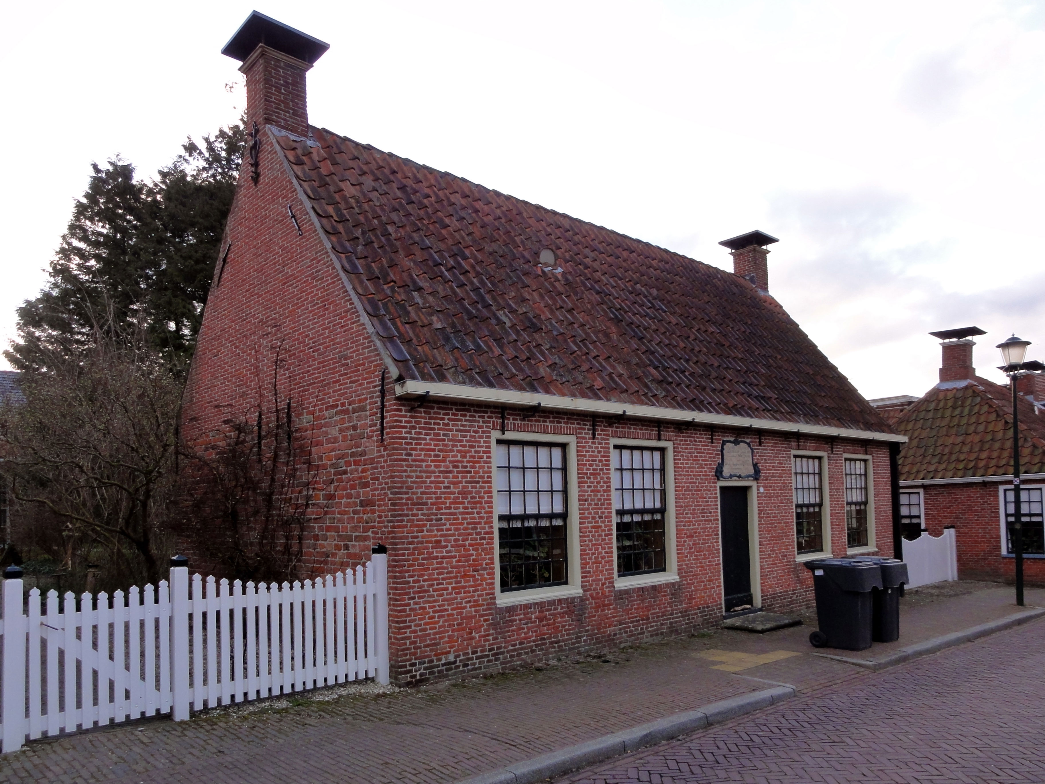 "Vrouw Franssensgasthuis" of (Geertje Schiltgasthuis") Hoofdstraat 17a te Warffum